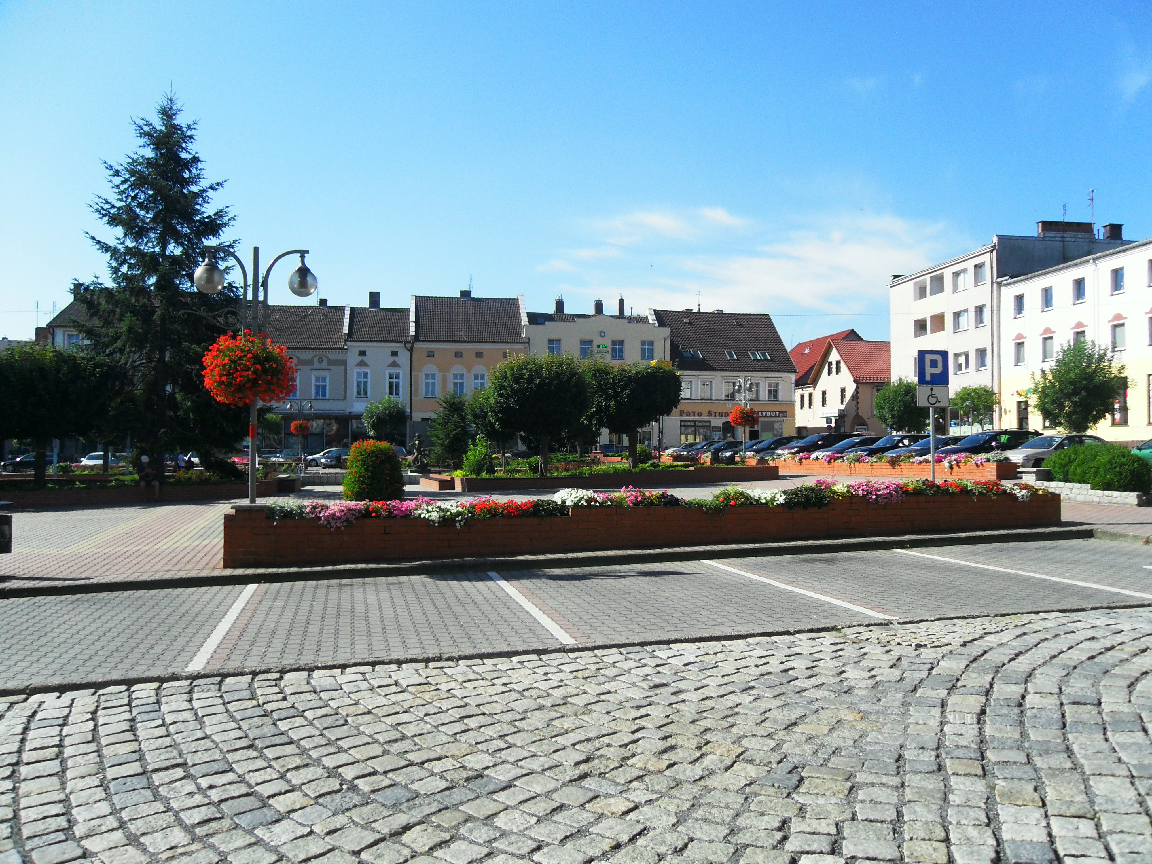 Krapkowice - widok rynku